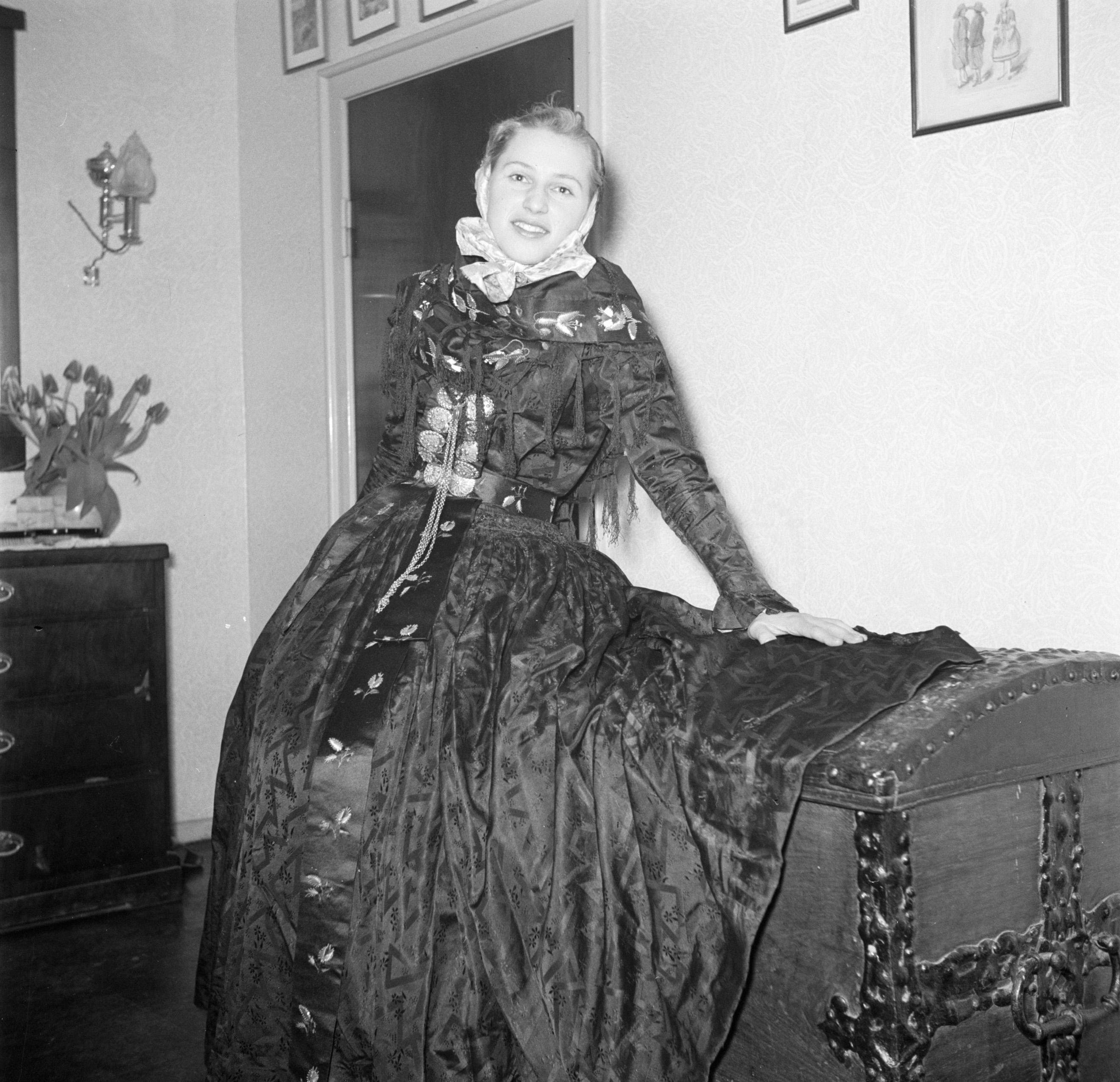 Collectie / Archief : Fotocollectie Van de Poll Reportage / Serie : Familie Dirchsen op hun boerderij Hollaendergaard Beschrijving : Dochter in klederdracht poseert zittend op een dekenkist Datum : maart 1954 Locatie : Denemarken, Store Magleby Trefwoorden : boerderijen, boeren, deuren, dochters, families, interieur, klederdrachten, meubilair, volkscultuur Persoonsnaam : Dirchsen, [...] Fotograaf : Poll, Willem van de, [onbekend] Auteursrechthebbende : Nationaal Archief Materiaalsoort : Negatief (zwart/wit) Nummer archiefinventaris : bekijk toegang 2.24.14.02 Bestanddeelnummer : 252-8784